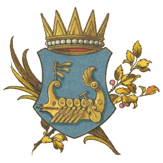 Wappen des Königreiches Illyrien bis zu seiner Auflösung im Jahre 1849